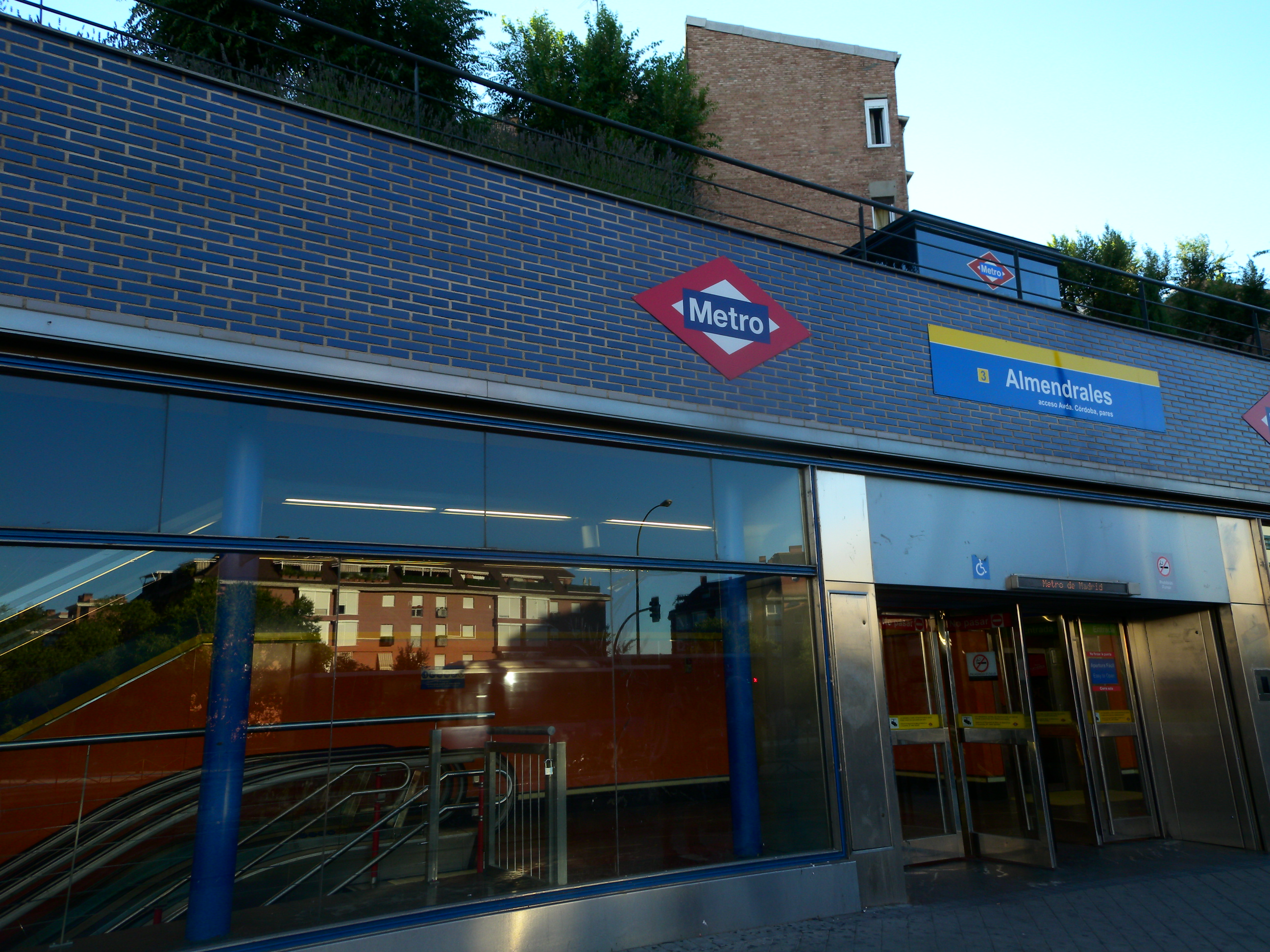 Metro de Madrid: (L3) Estación de Almendrales.